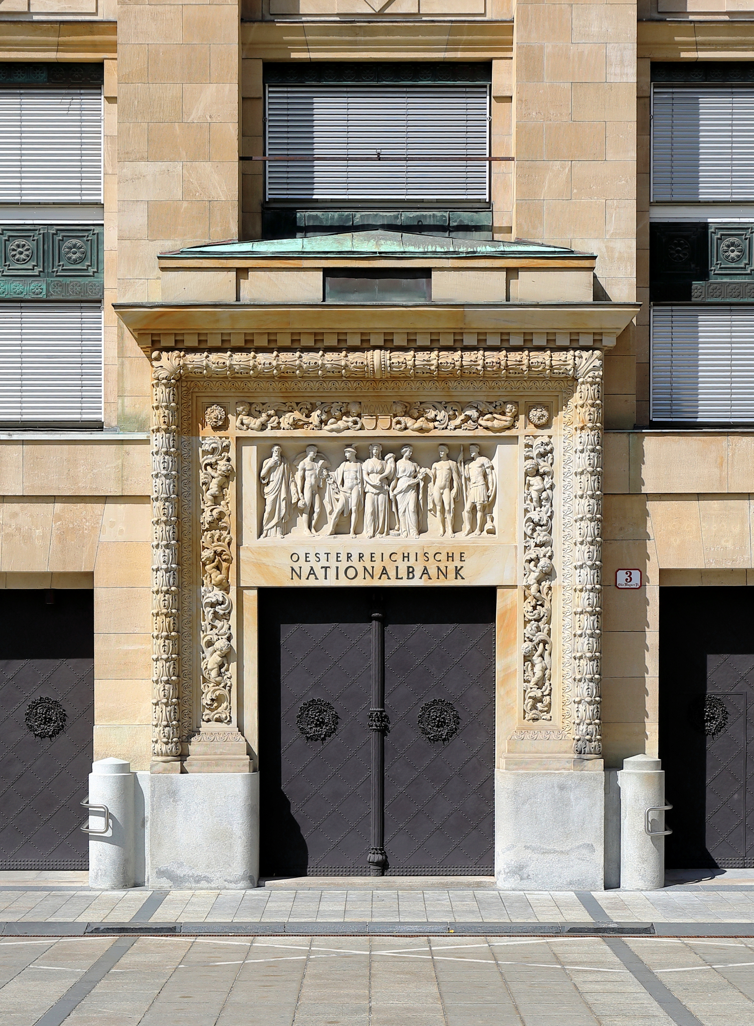 Das Hauptportal des Hauptgebäudes der Österreichischen Nationalbank am Otto Wagner-Platz 3 im 9. Wiener Gemeindebezirk Alsergrund. Der Portalschmuck mit dem Relief ist über den zwei leeren Wappenfeldern mit 1915 datiert und wurde von dem Bildhauer Othmar Schimkowitz geschaffen.